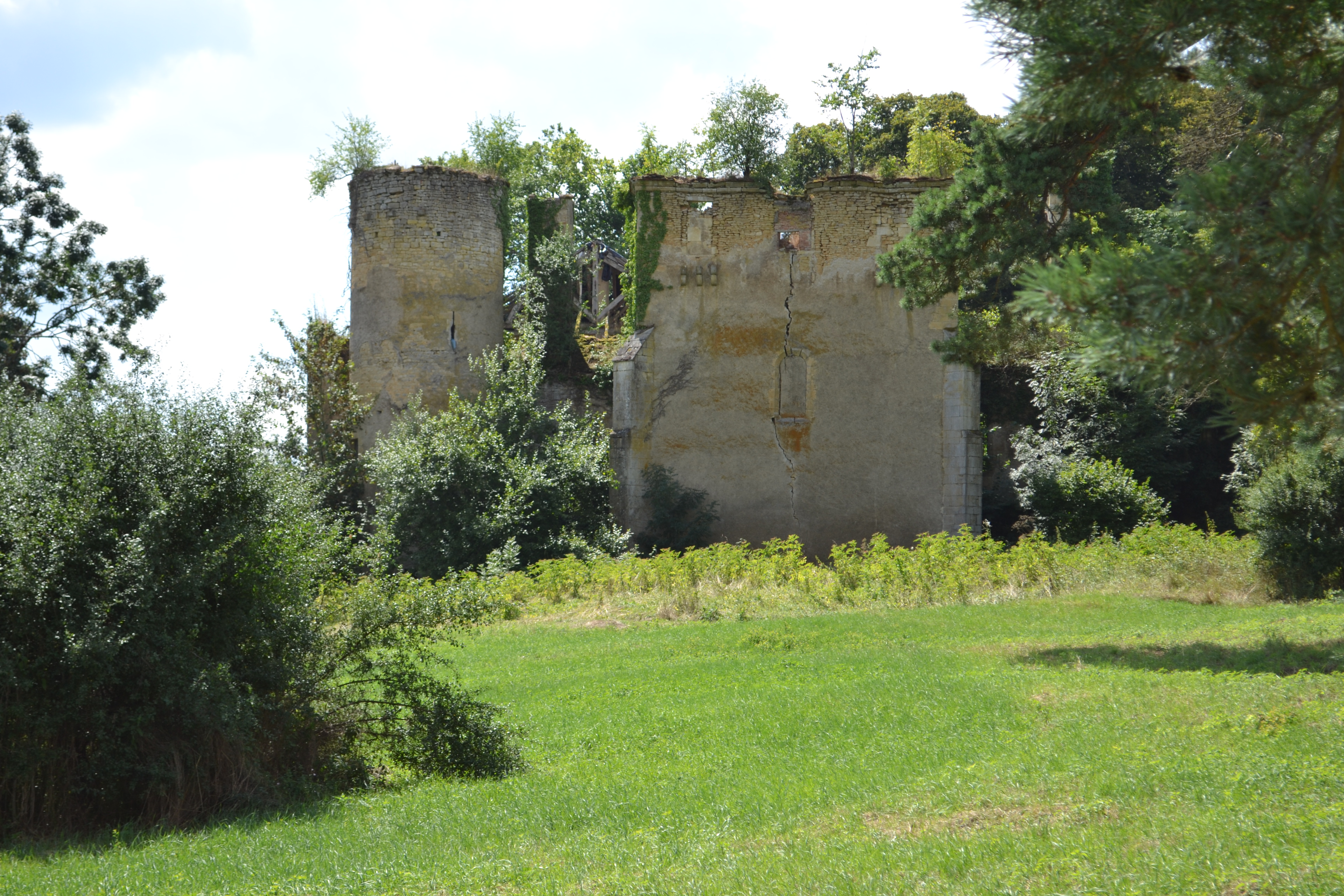 Château de Champlemy (Nièvre)